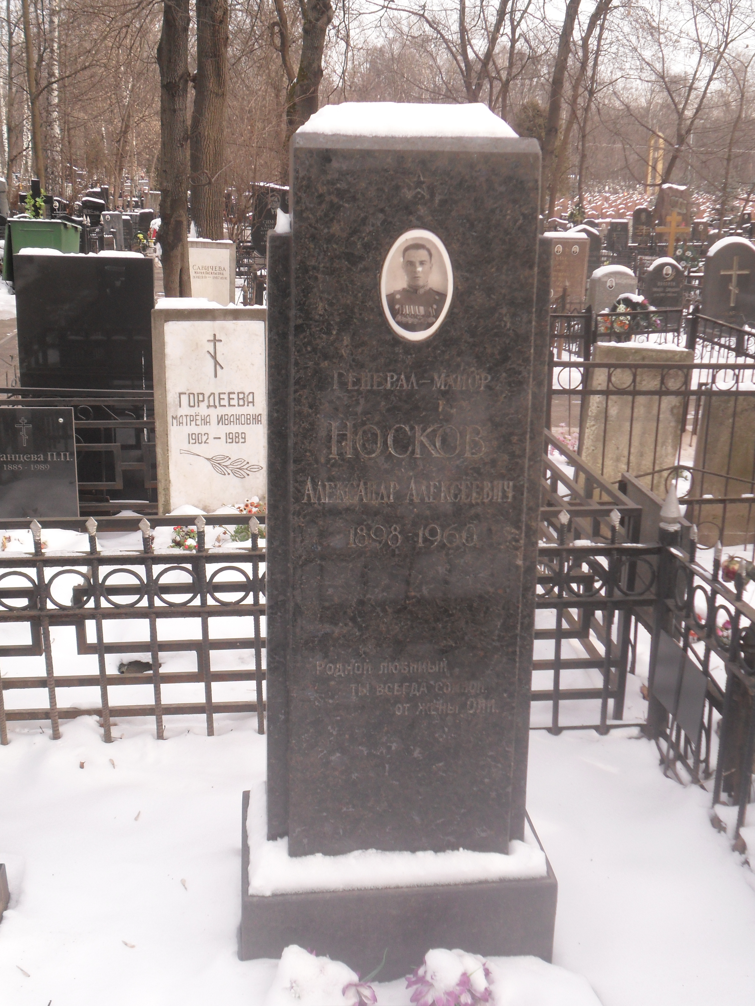 Могила генерал-майора Александра Носкова на Преображенском кладбище Москвы.